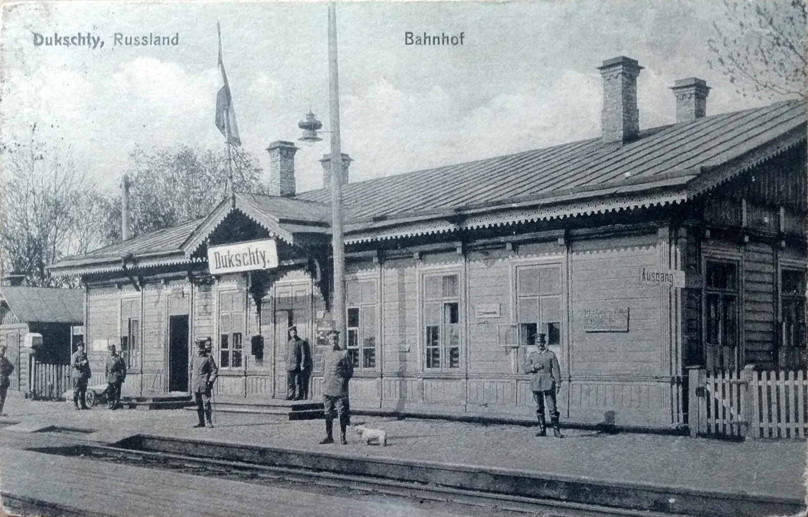 Беларуская (тарашкевіца): Дукшты (Dukšty), вуліца Чыгуначная (vulica Čyhunačnaja). Чыгуначная станцыя